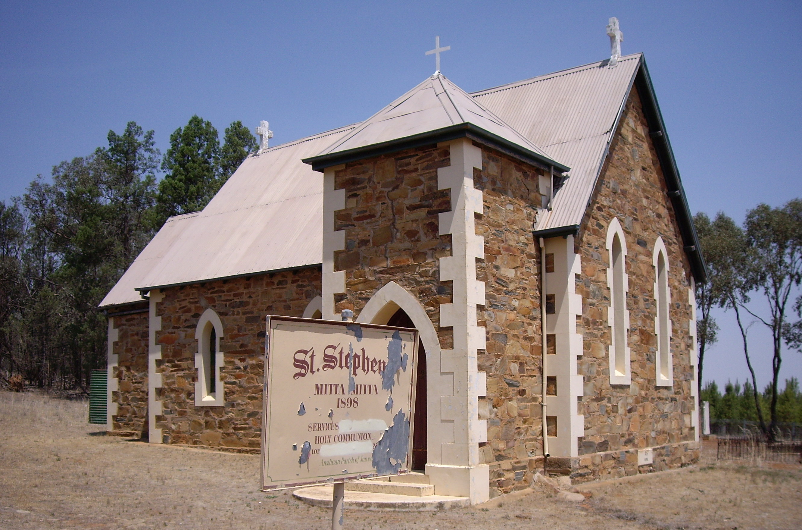 St Stephen's Anglican Church, Mitta Mitta